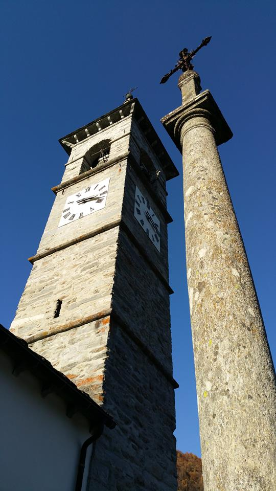 Campanile e obelisco di Comologno